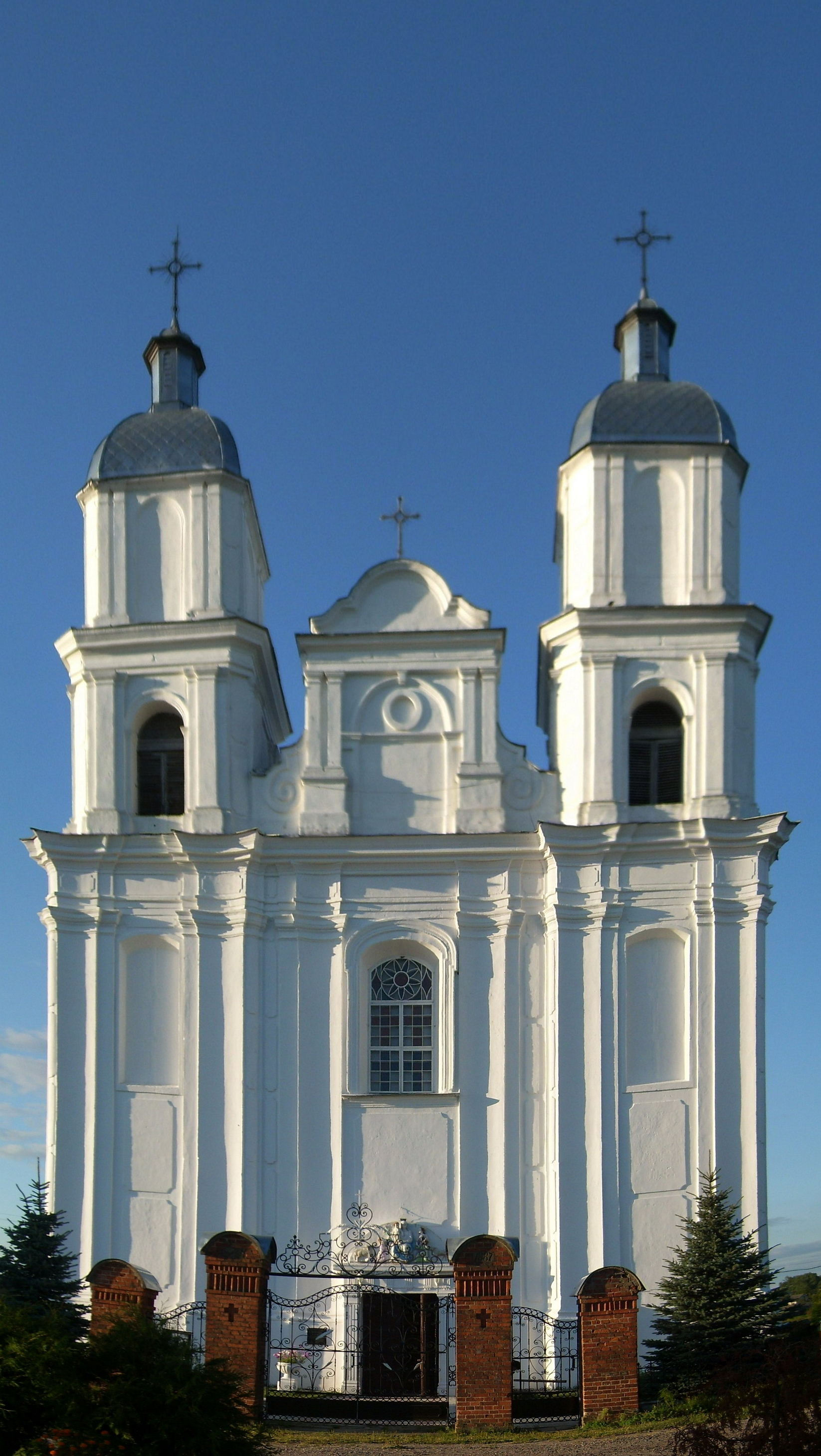 Беларуская (тарашкевіца): Касьцёл Найсьв. Тройцы. в. Дунілавічы